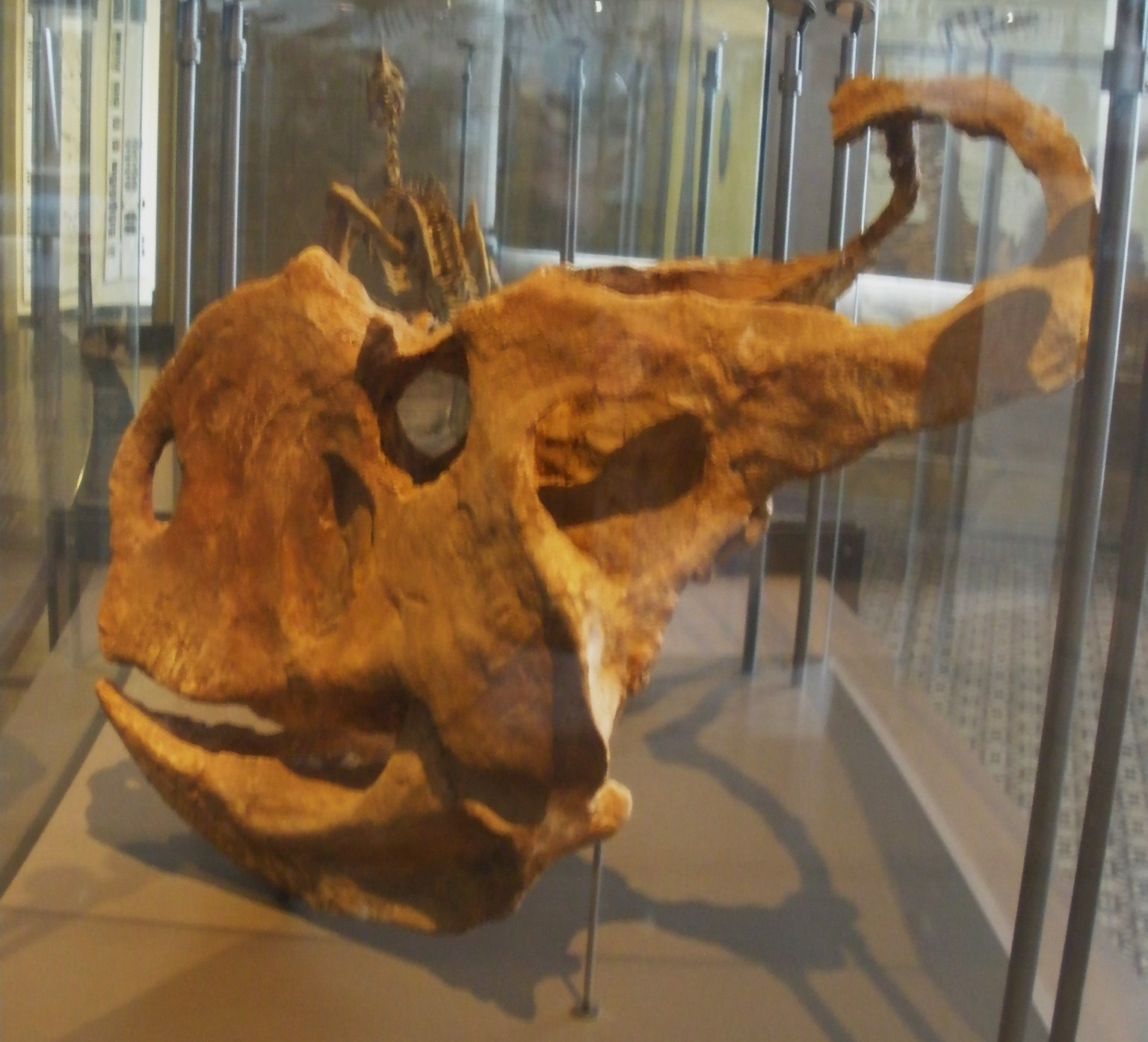 Fossil of Protoceratops, a ceratopsian dinosaur Took the photo at Musee d'Histoire Naturelle, Brussels